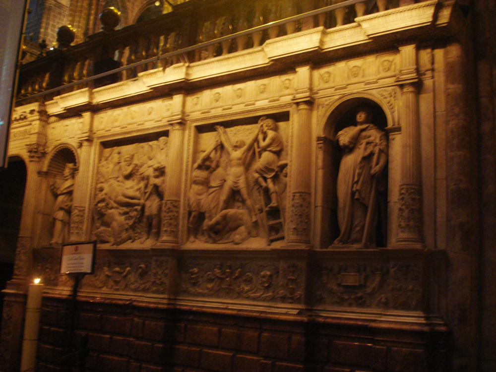 Catedral de Barcelona - Trascoro derecho